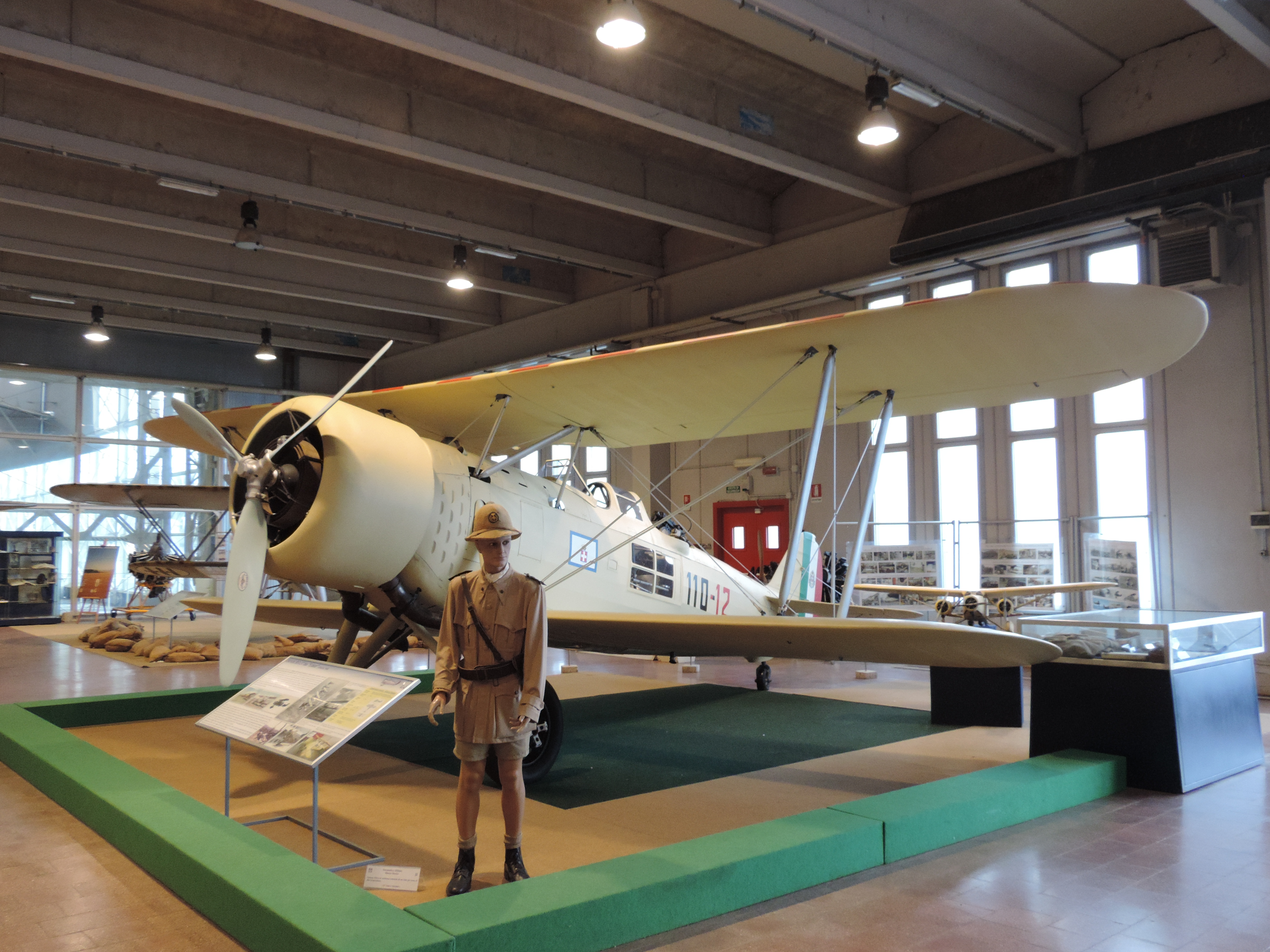 IMAM Ro.37 im Luftwaffenmuseum Vigna di Valle